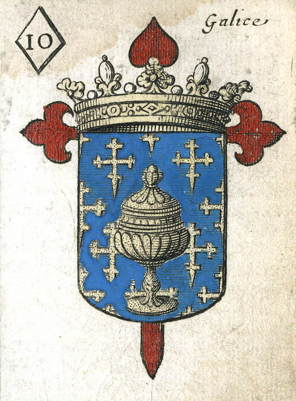 Escudo de Galiza no Jeu d'armoiries des souverains et états d'Europe de Finé de Brianville (1659).